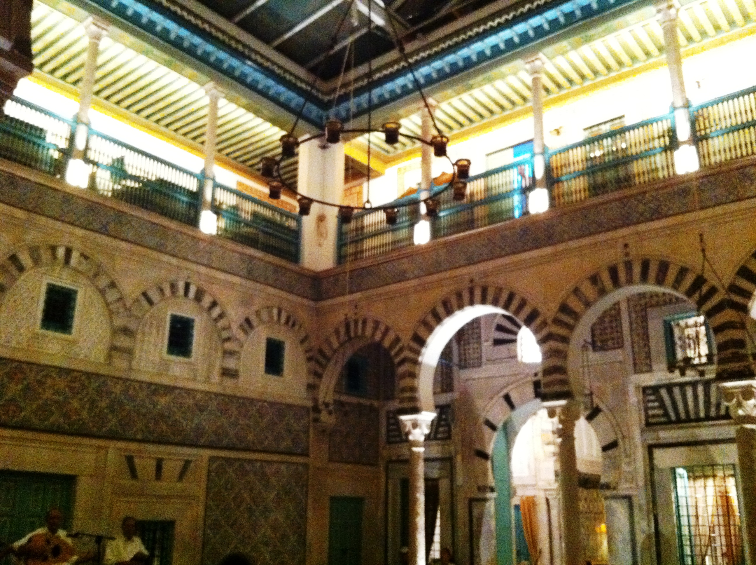 Vue du patio central et de la galerie supérieur du palais Dar Hammouda Pacha, ex-Dar Chahed, dans la médina de Tunis, Rue Sidi Ben Arous.